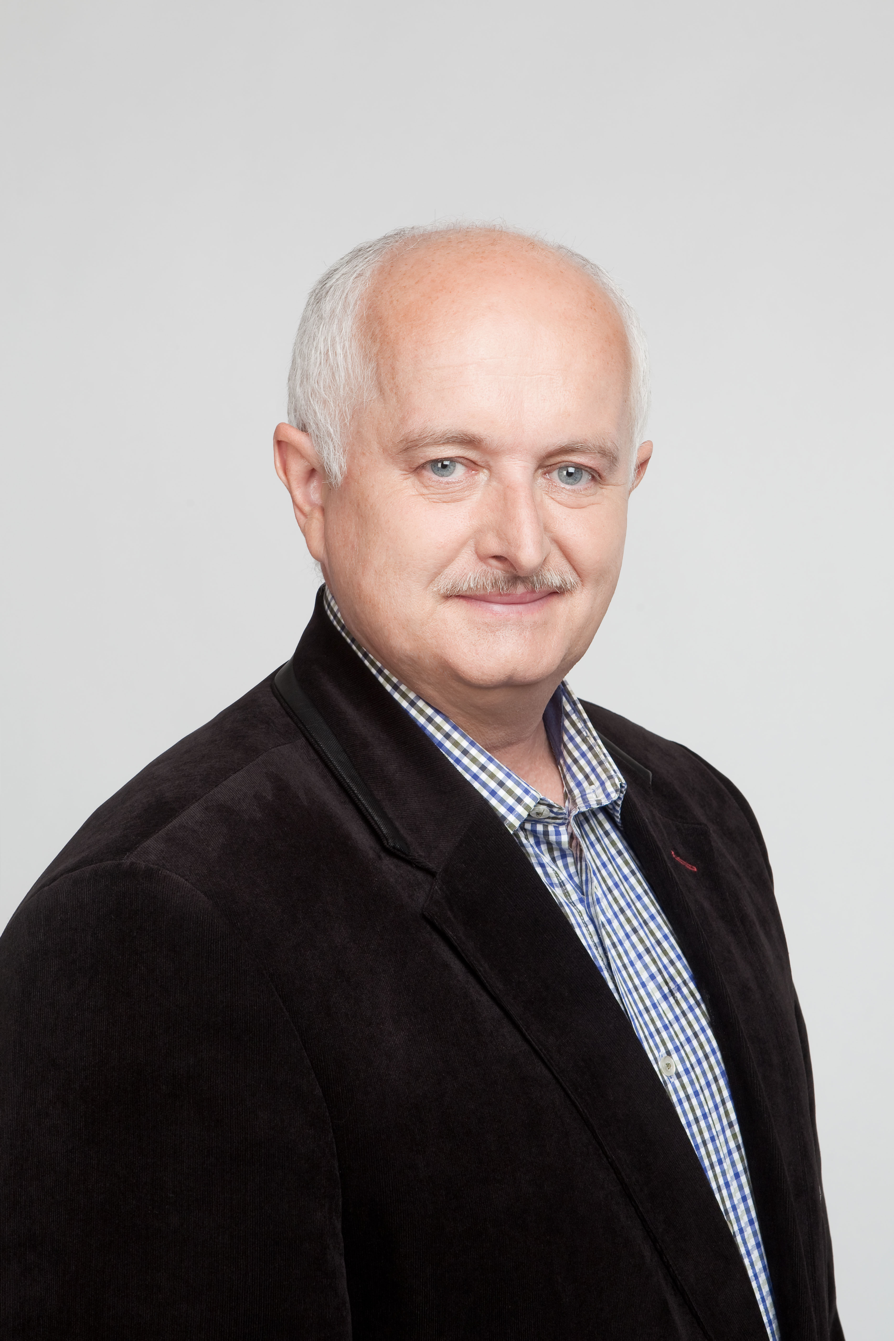 Fotografie starosty Poděbrad PhDr. Ladislava Langra